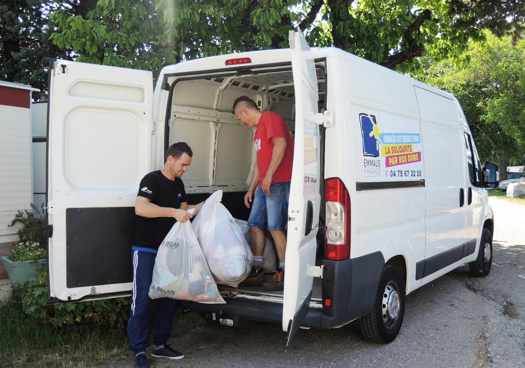 Bogy détail